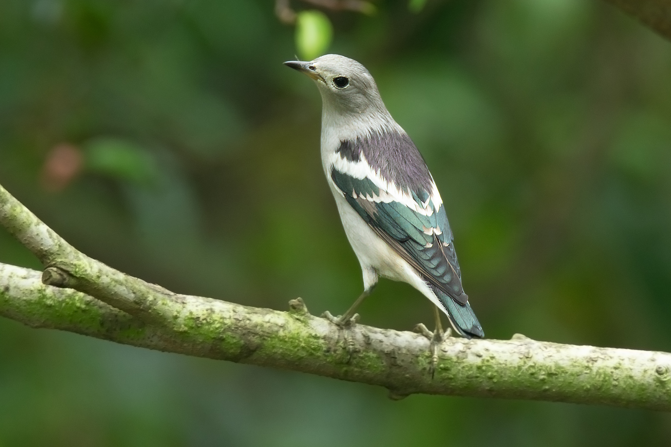 Daurian Starling (Agropsar sturninus), Kent Ridge Park, Singapore